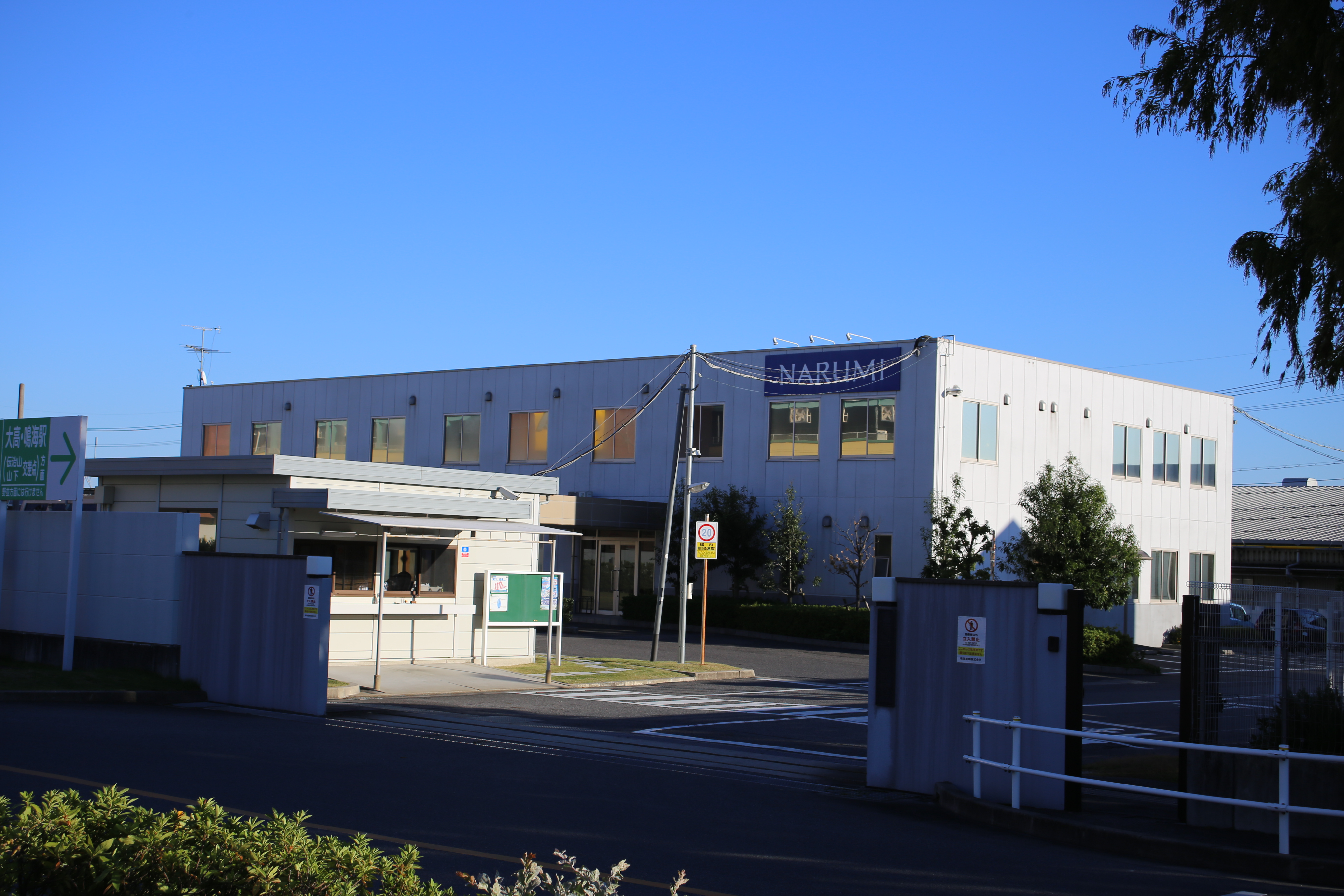 名古屋市緑区鳴海町字伝治山の鳴海製陶本社入口を北西側より撮影